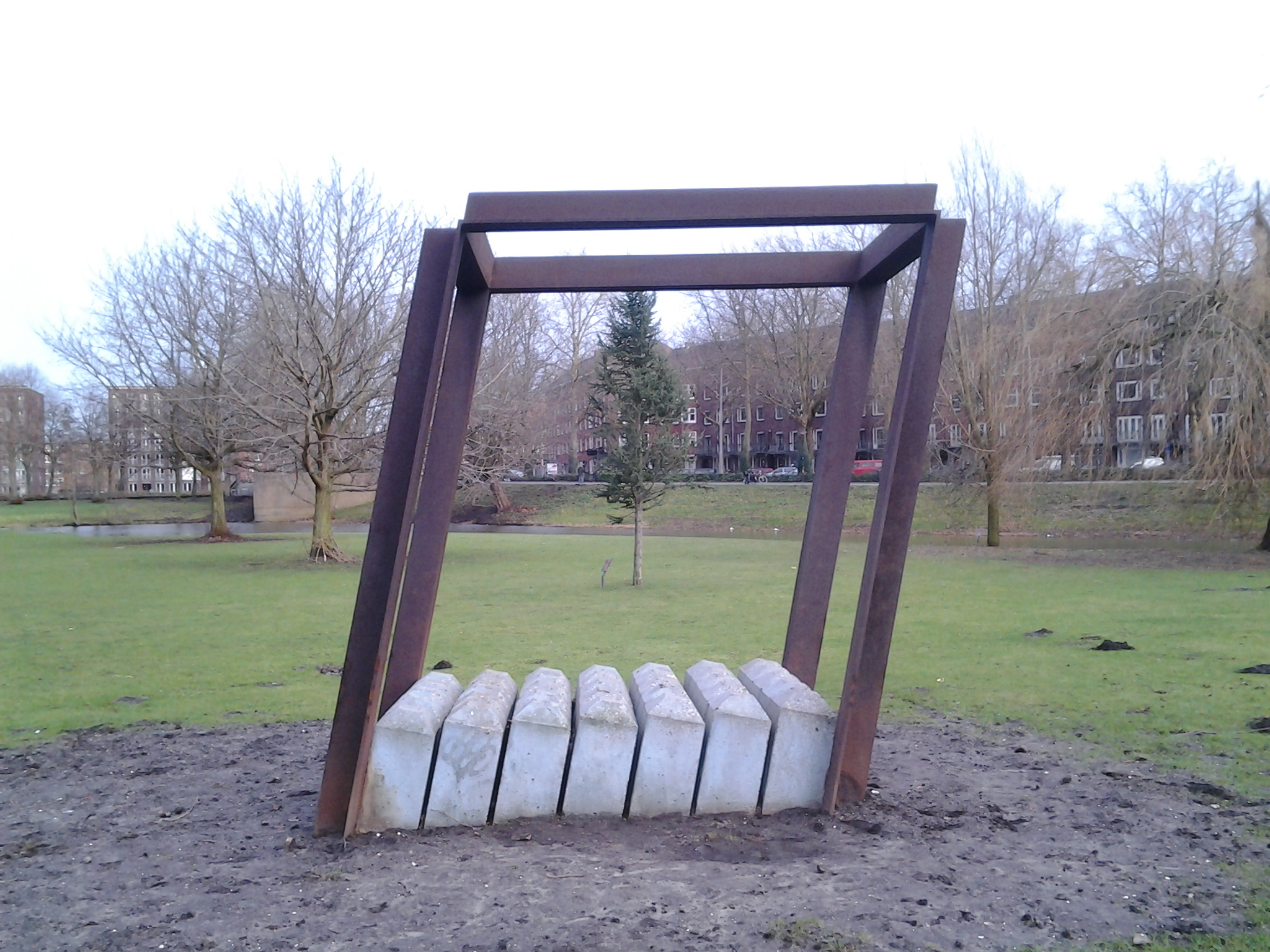 object Monument voor een verzonken stad, van Berend Peter, in Erasmuspark, Amsterdam.